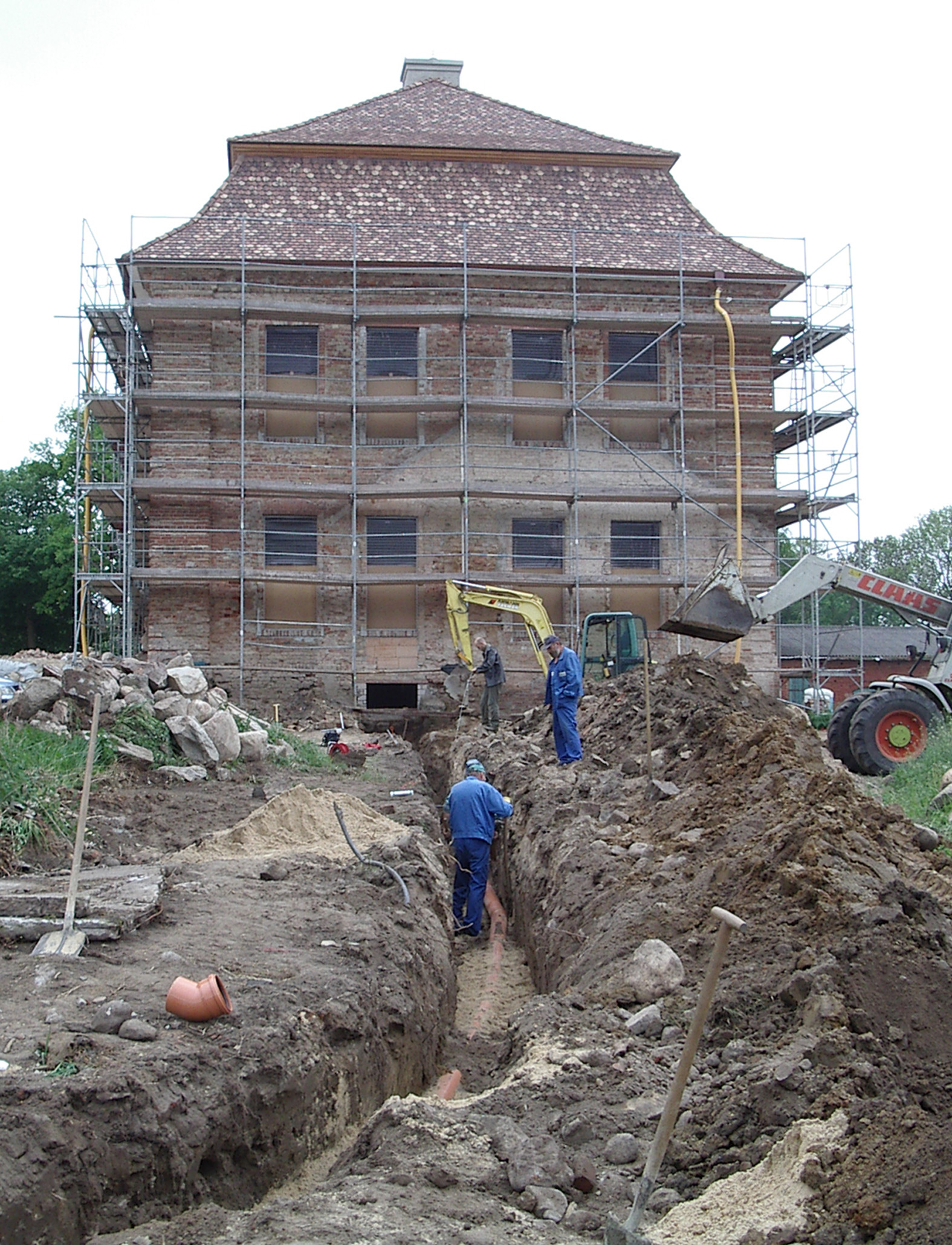 Eickstedt, Gutshaus während Sanierungsmaßnahmen im Jahre 2006